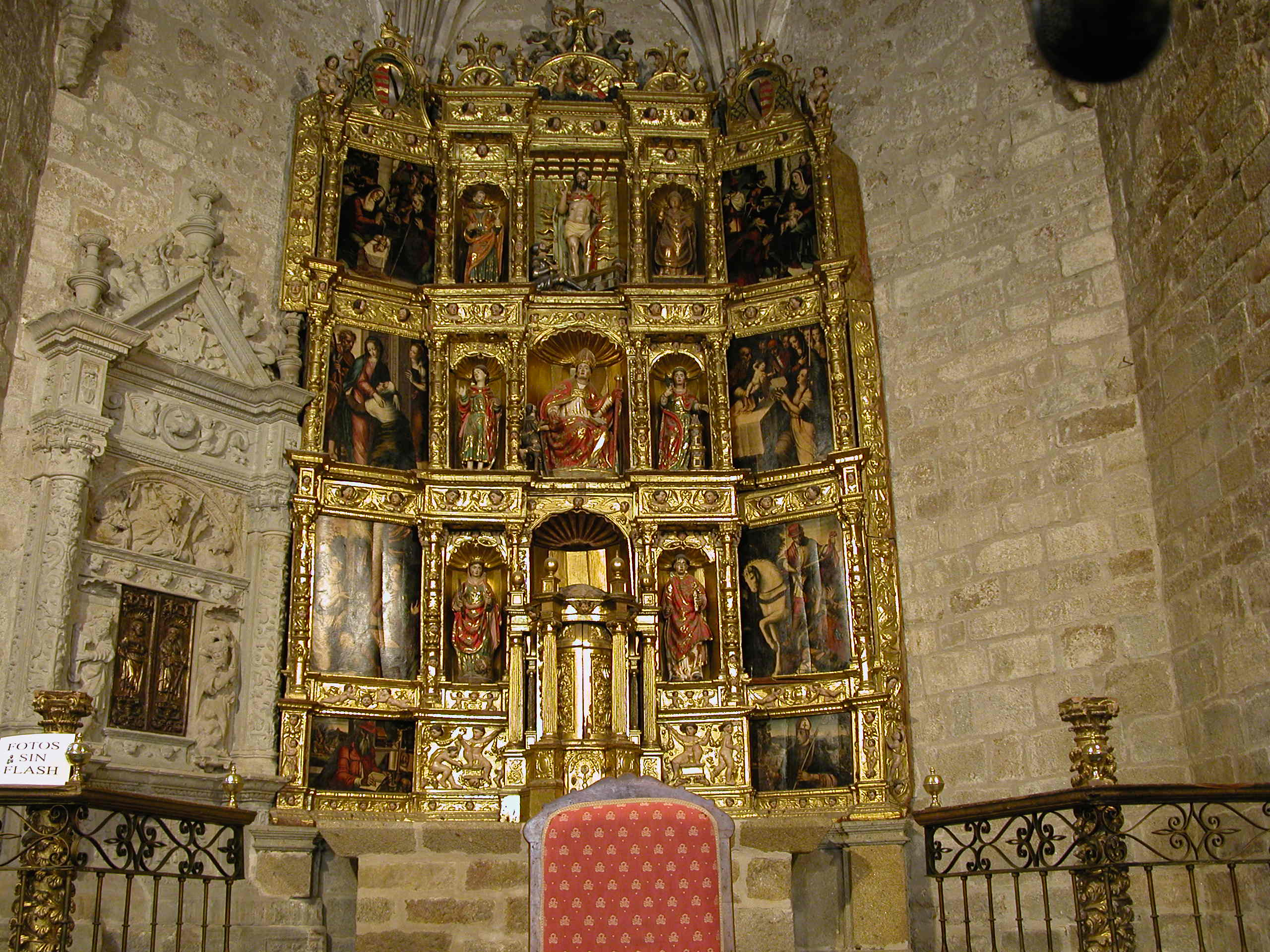 Retablo de la iglesia de san Martin en Plasencia